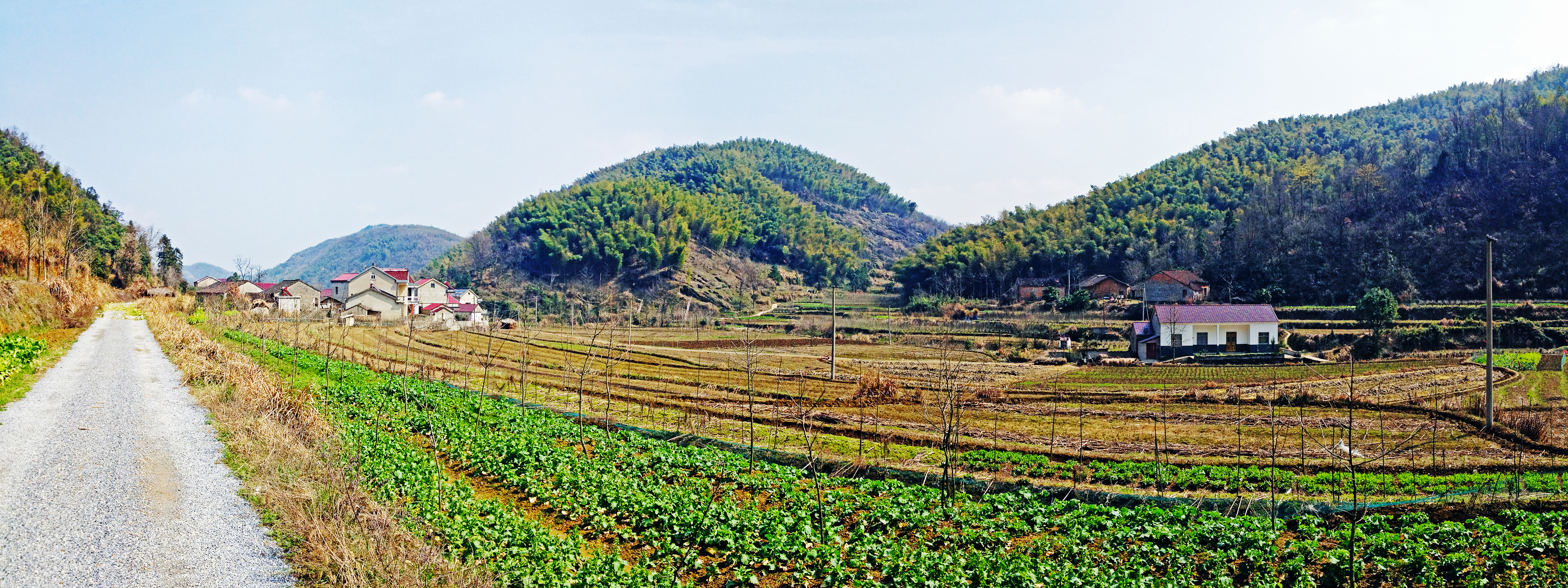 20140309泾县榨里王村山间田园